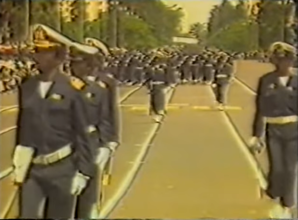 Membres de la marine zaïroise lors d'une parade. Extrait du reportage "Mobutu Sese Seko : bâtisseur du Zaïre nouveau", 1985, diffusé via la RTBF